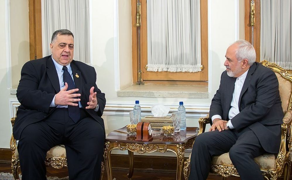 حموده یوسف صباغ رئیس مجلس سوریه صبح امروز چهارشنبه ۲۷ دیماه با محمد جواد ظریف وزیر امور خارجه دیدار و گفت و گو کرد.